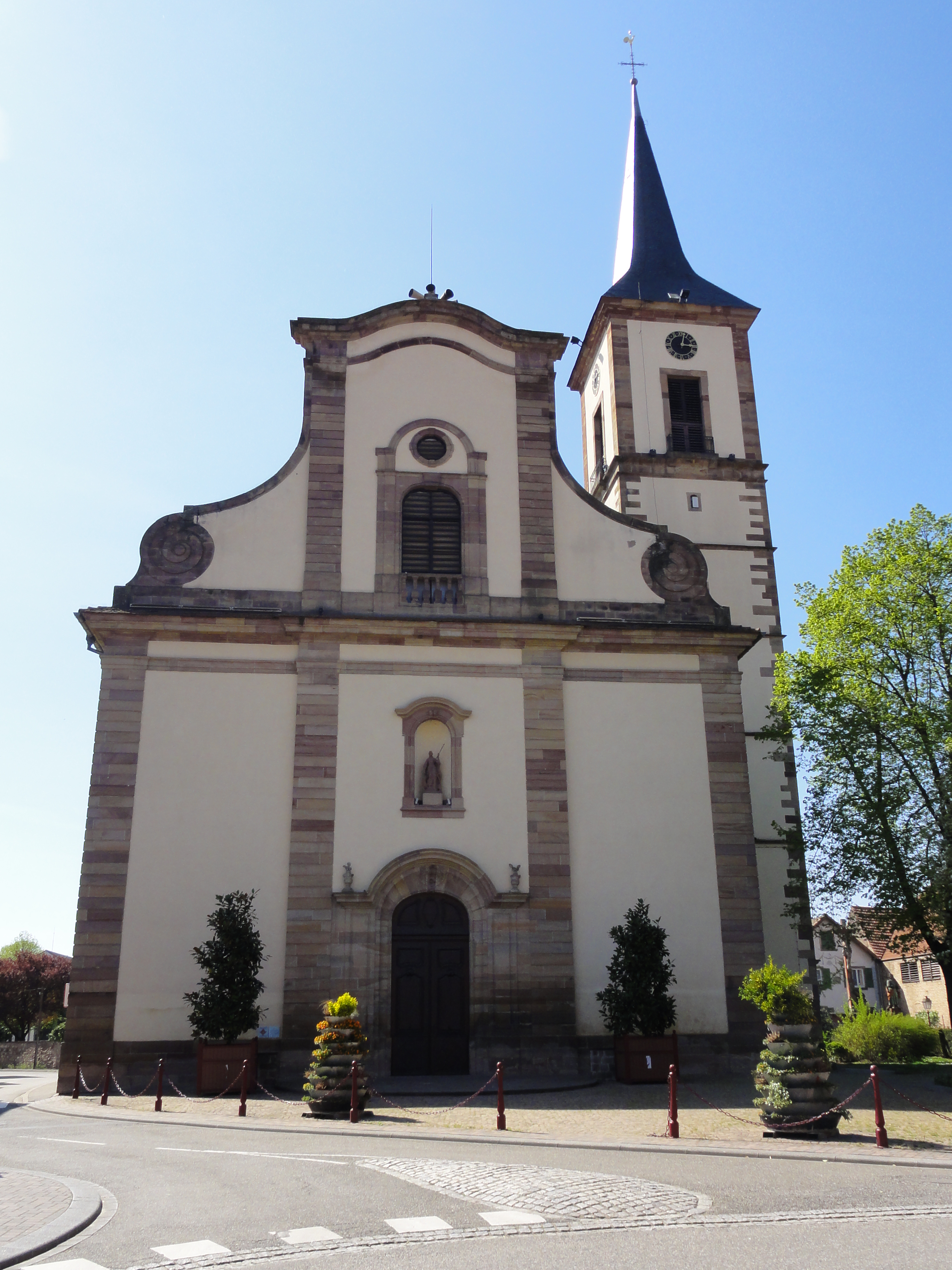 Alsace, Bas-Rhin, Église Sainte-Marguerite de Geispolsheim (PA00085279, IA00023181).